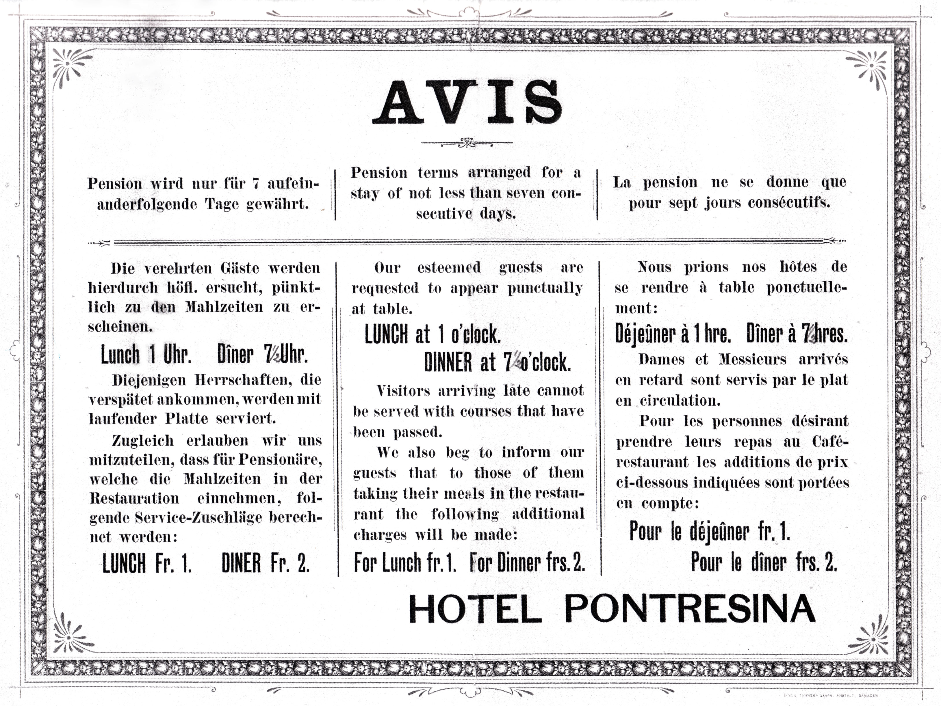 Hotel Pontresina, Pontresina: dreisprachiges Avis an die Gäste zur Regelung der Mahlzeiten